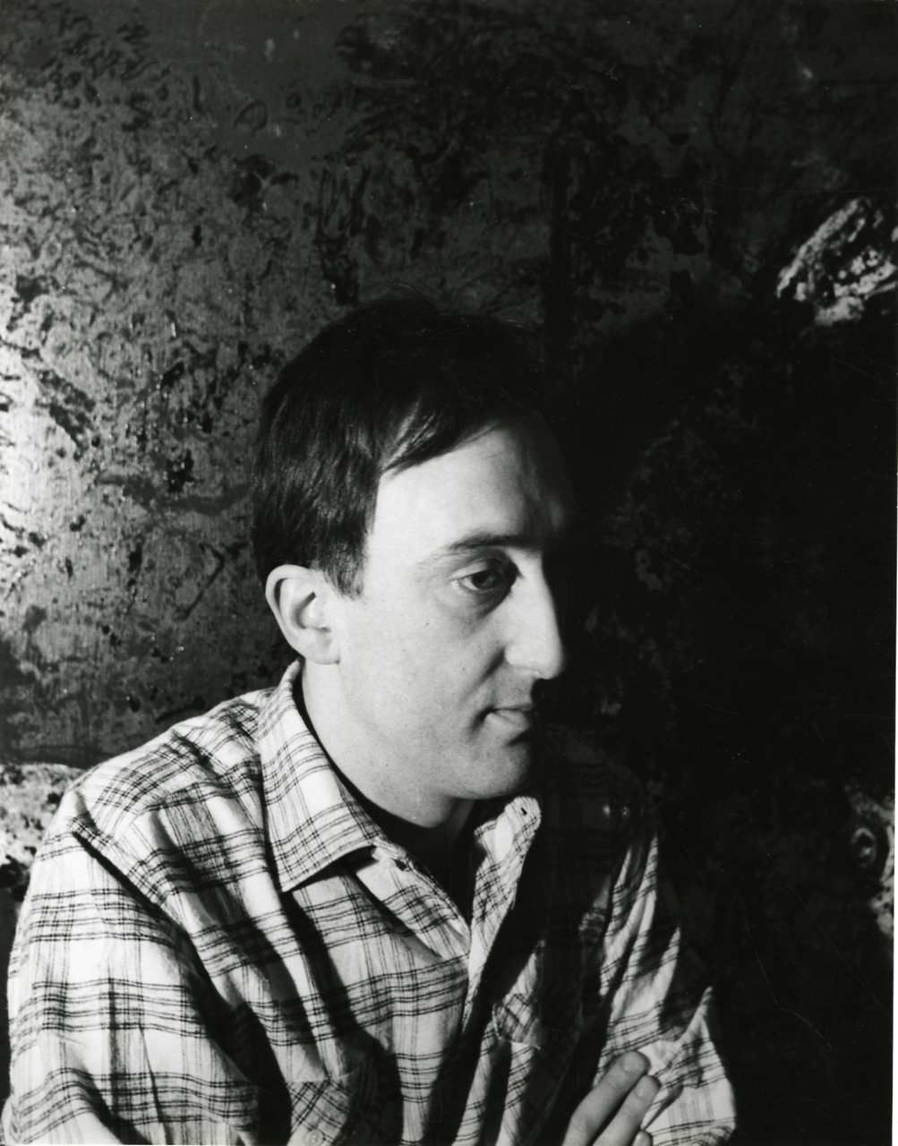 Servizio fotografico : Italia, 1955 / Paolo Monti. - Stampe: 3 : Positivo b/n, gelatina bromuro d'argento/ carta, 18x24, 24x30. - ((Al verso delle stampe manoscritto: "Il pittore Baj 1954". Sul coperchio della scatola manoscritto: "Ritratti Artisti".